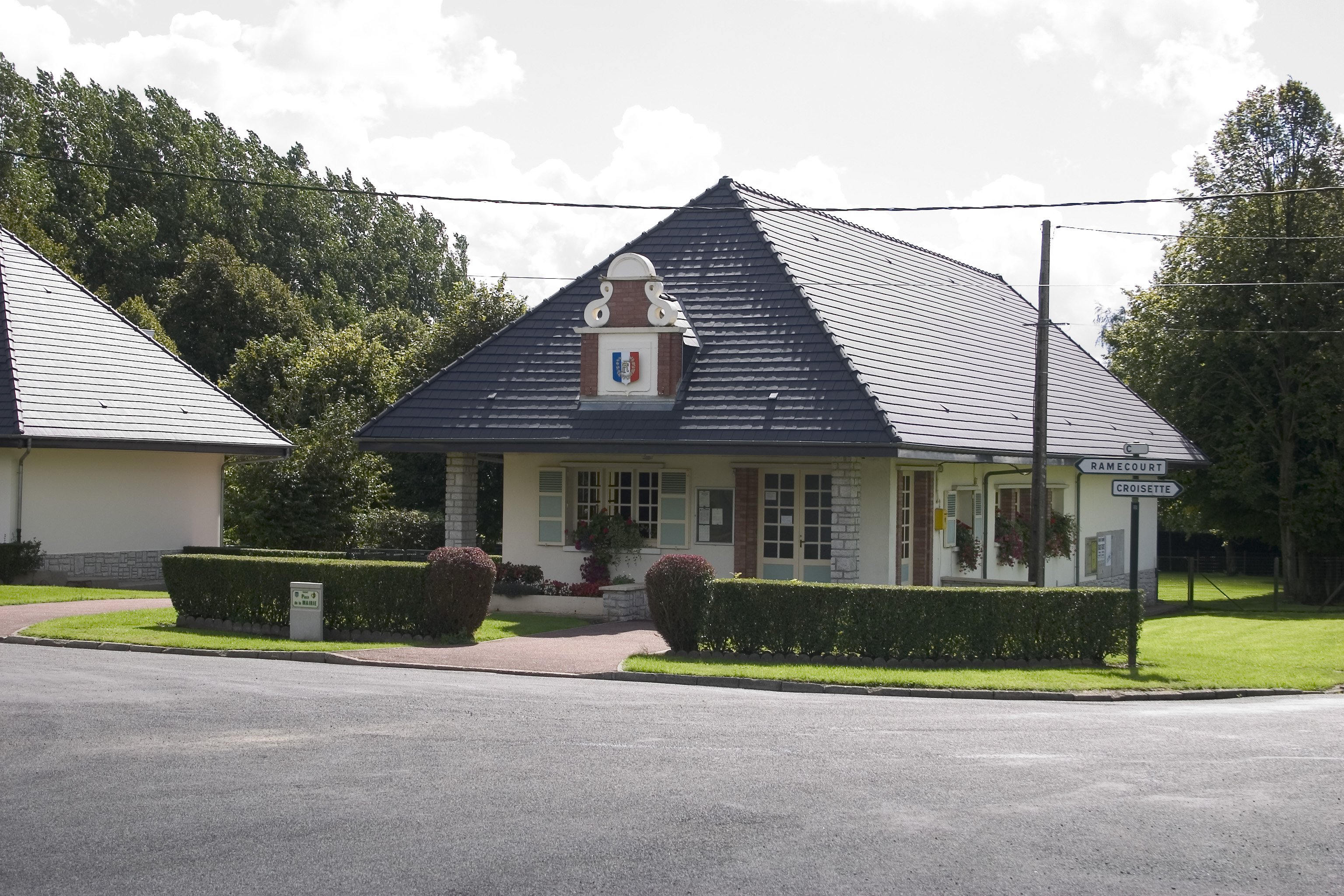 Le bâtiment communal de Siracourt